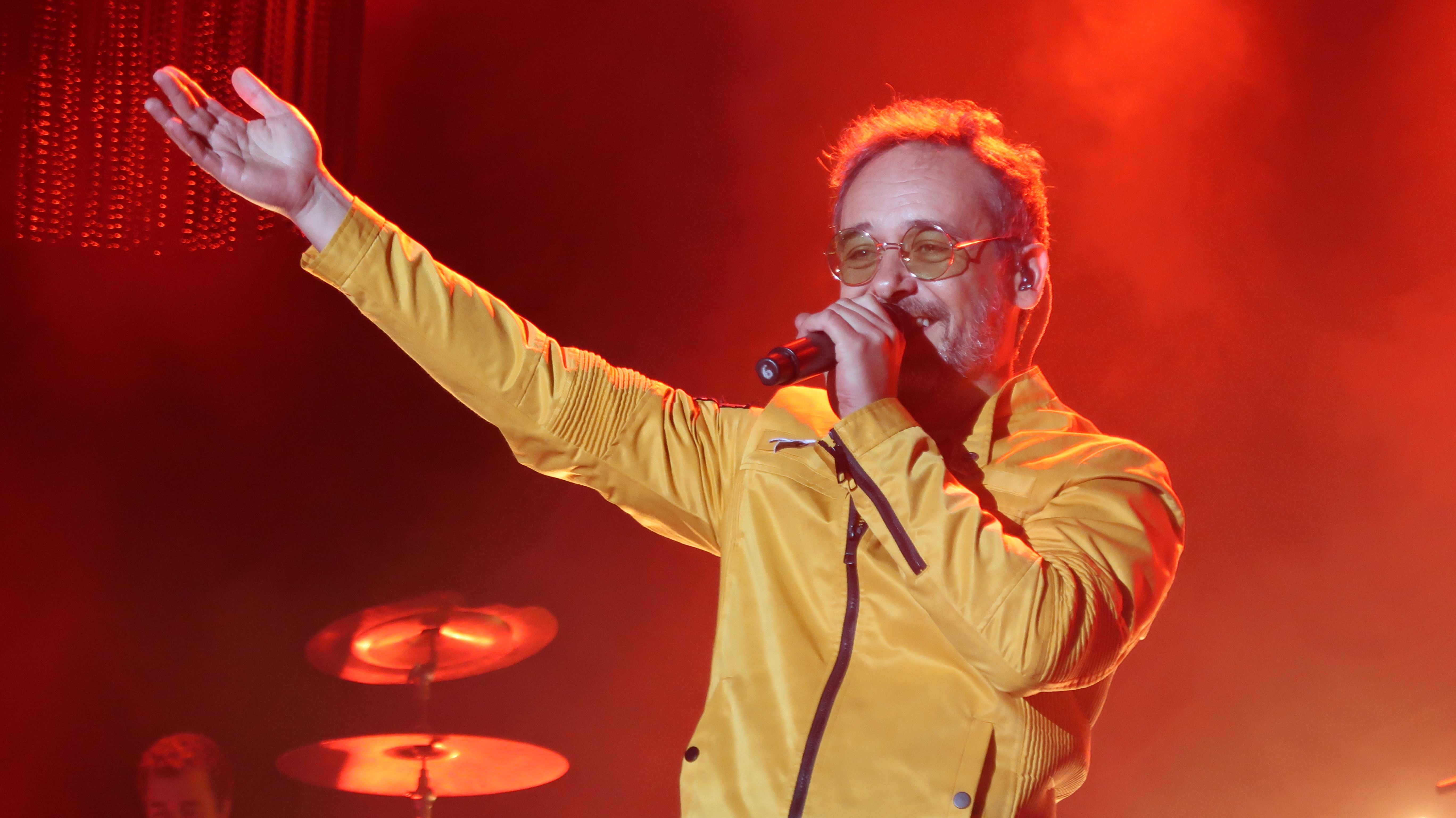 Santi Balmes, cantante de la banda Love of Lesbian, durante su concierto en el festival Sonorama Ribera 2019 en Aranda de Duero (Burgos), en España